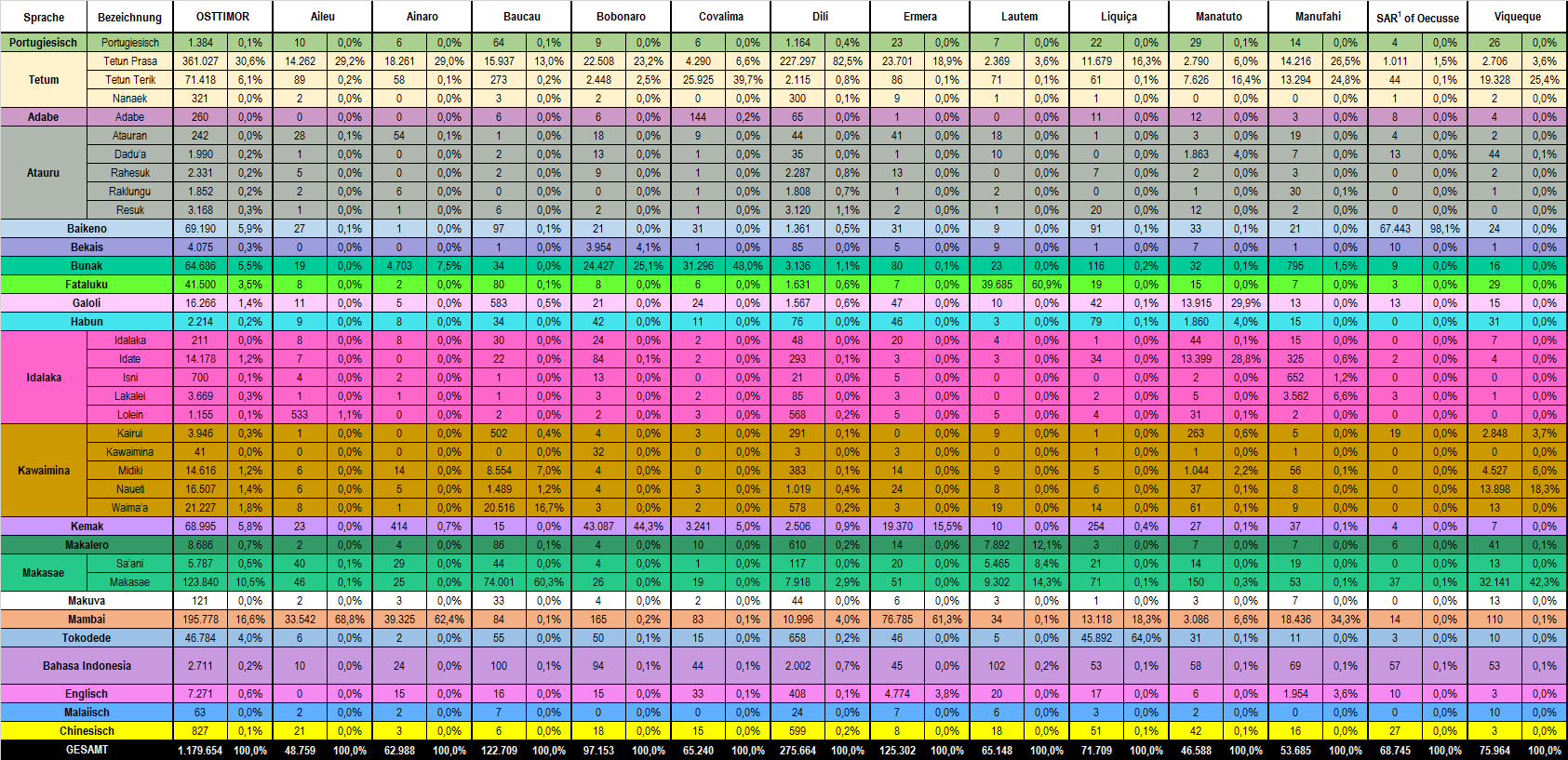 Anzahl der Muttersprachler der Sprachen Osttimors in den einzelnen Distrikten